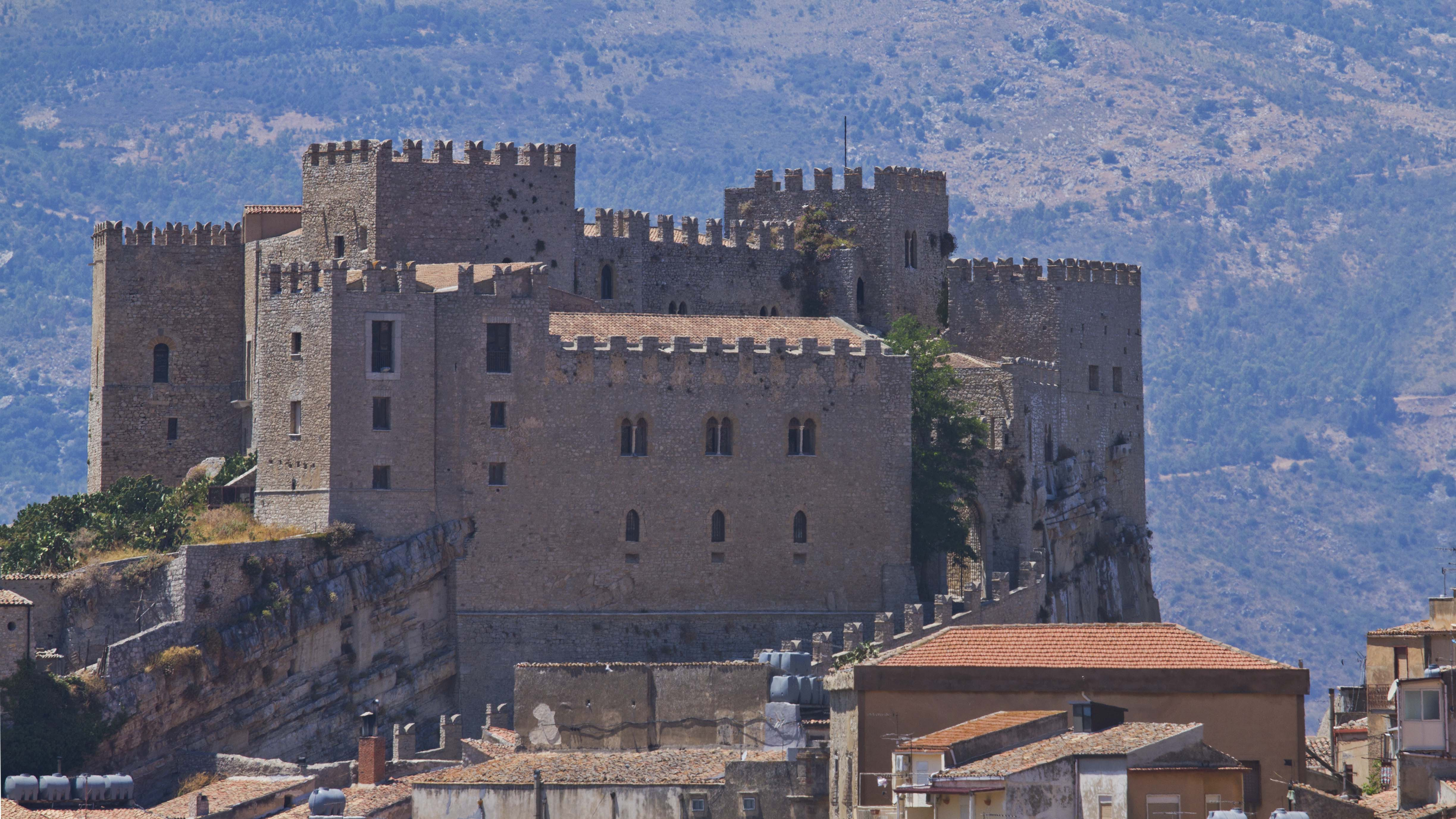 90012 Caccamo PA, Italy